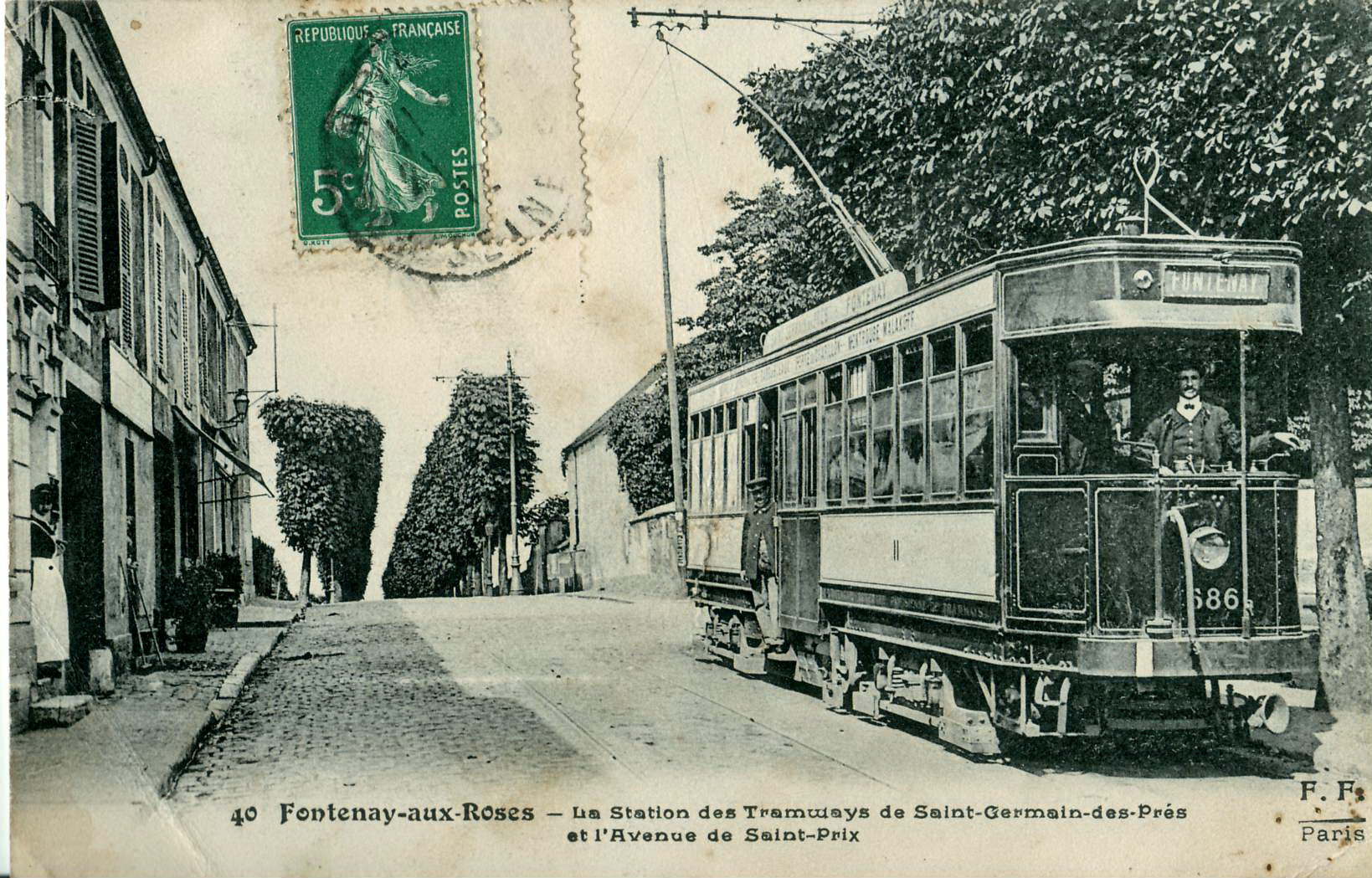 Carte postale ancienne éditée par FF Fleury, N°40Fontenay-aux-Roses - La station des tramways de Saint-Germain-des-Prés et l'avenue de Saint-Prix